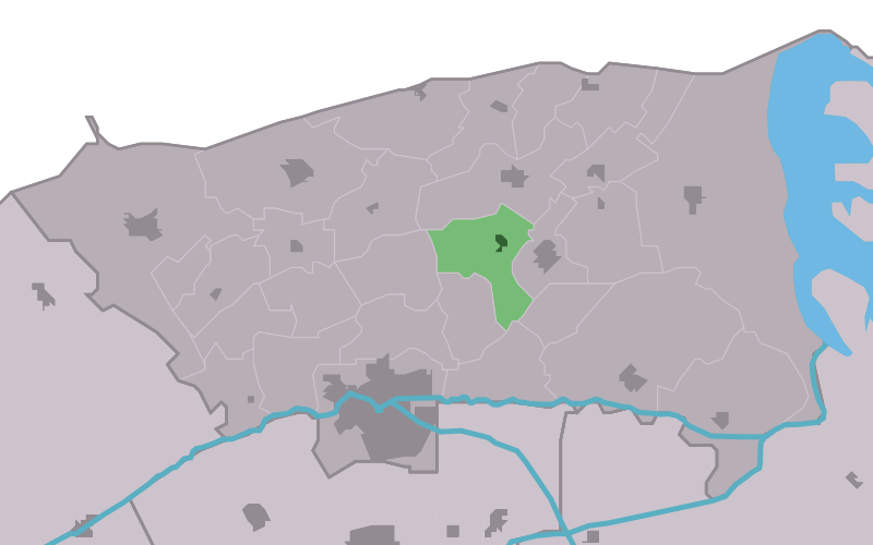 Kaartsje fan himrik fan Nijewier